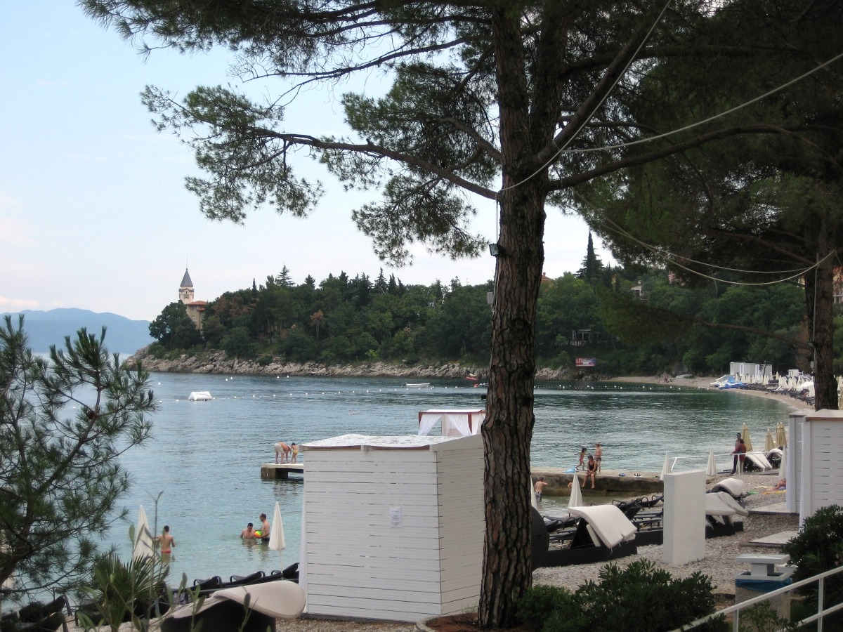 Medveja